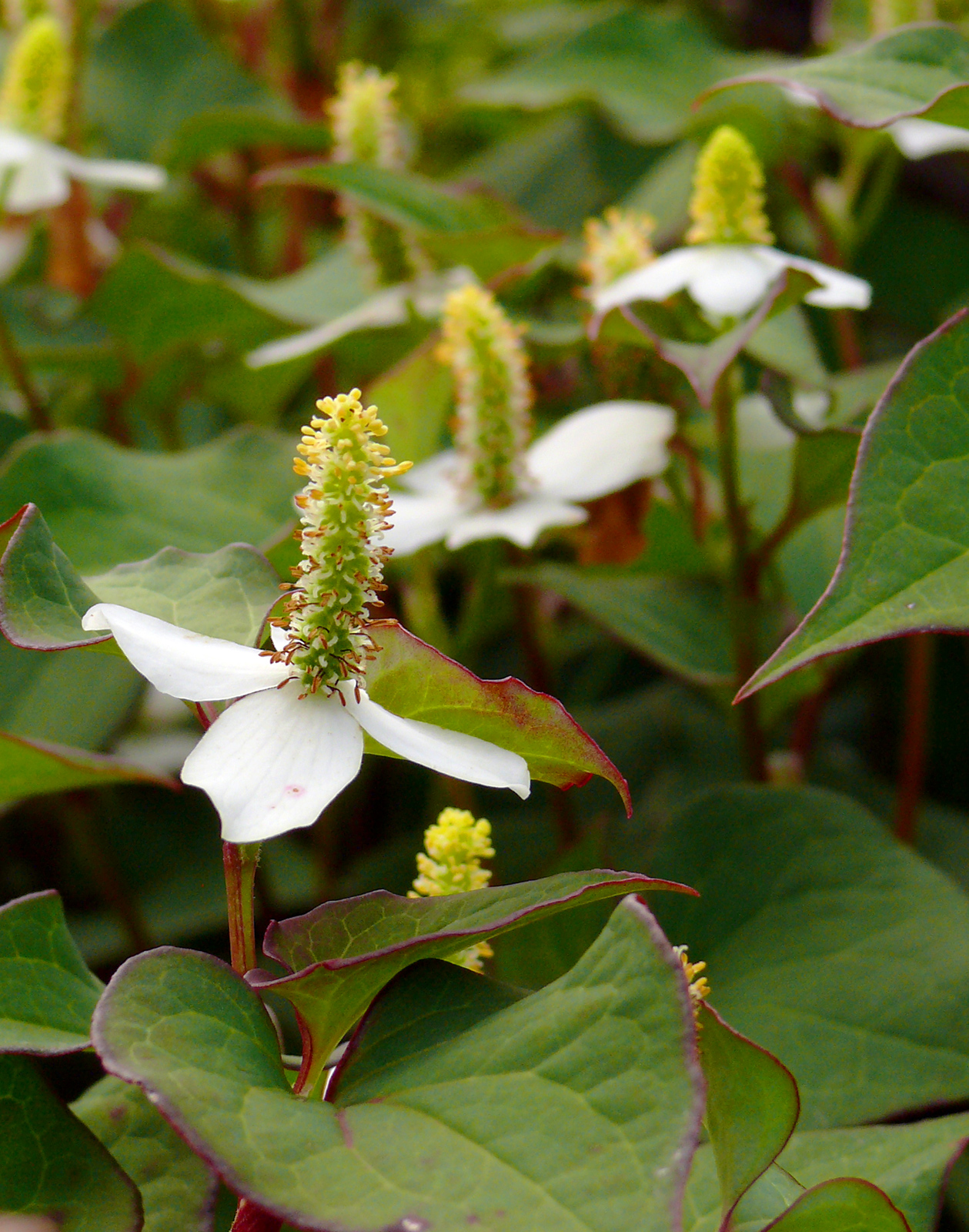 ドクダミの花 (Houttuynia cordata )